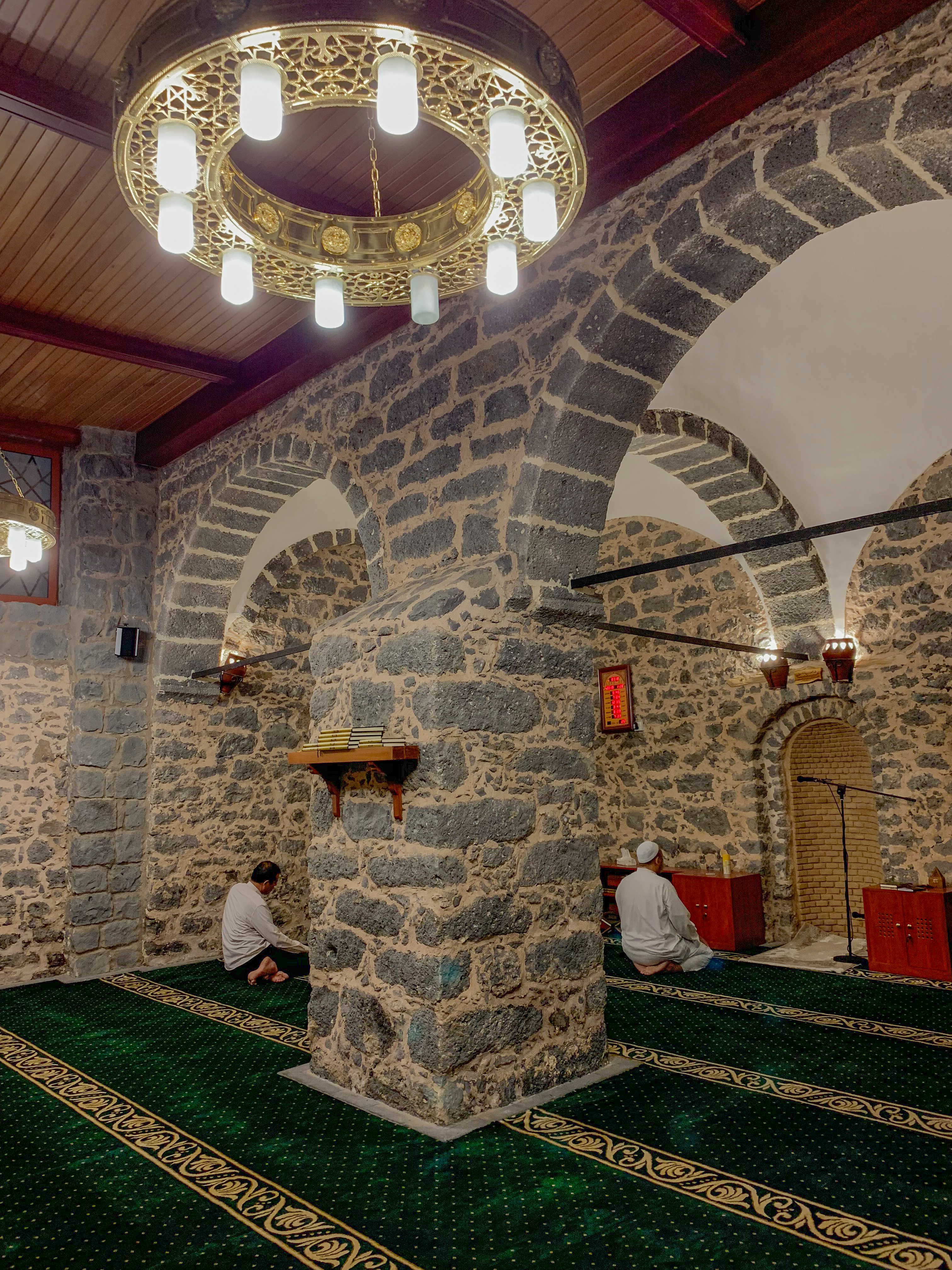 مسجد الدرع في المدينة المنورة